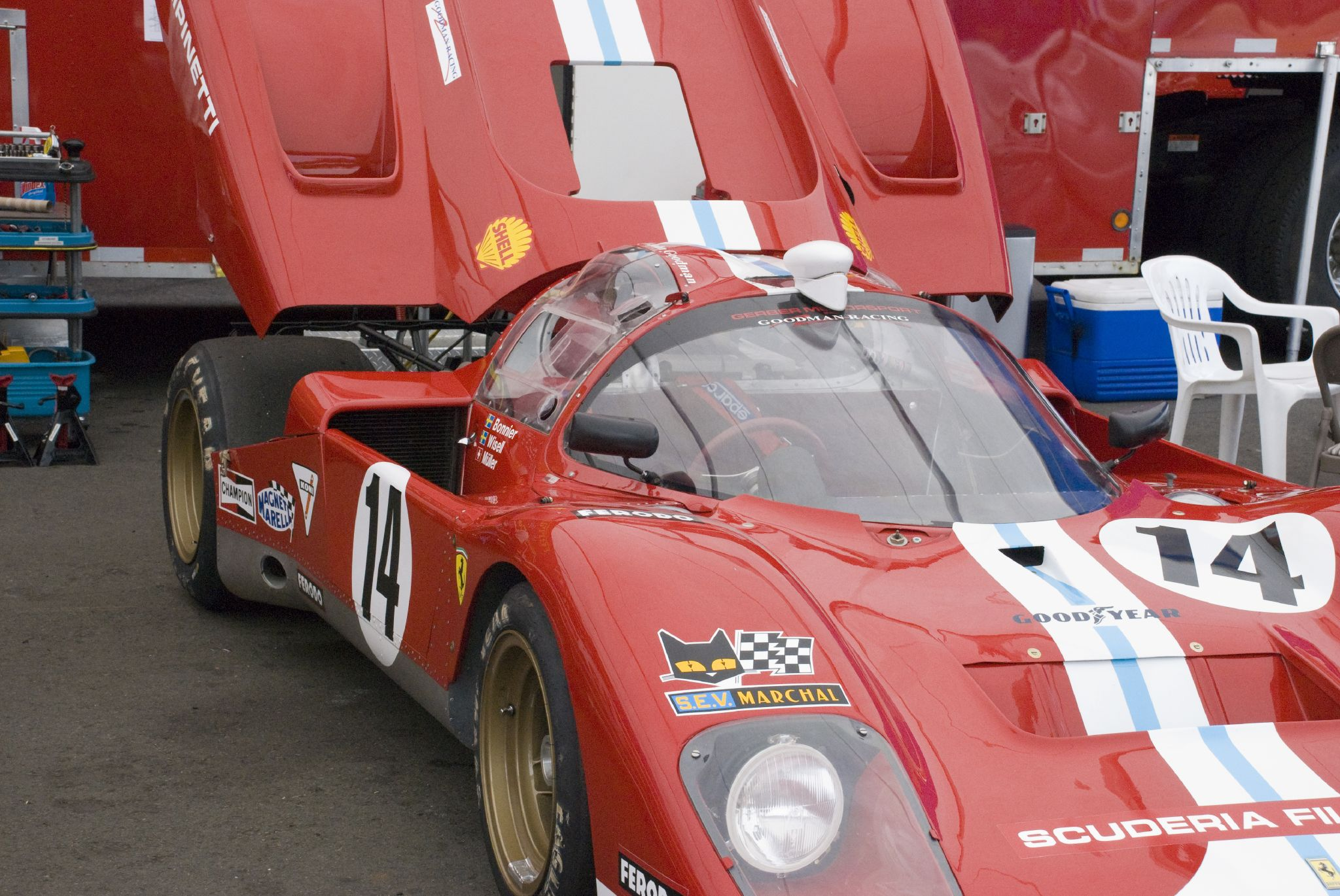 Scuderia Filipinetti's Ferrari 512M chassis #1008